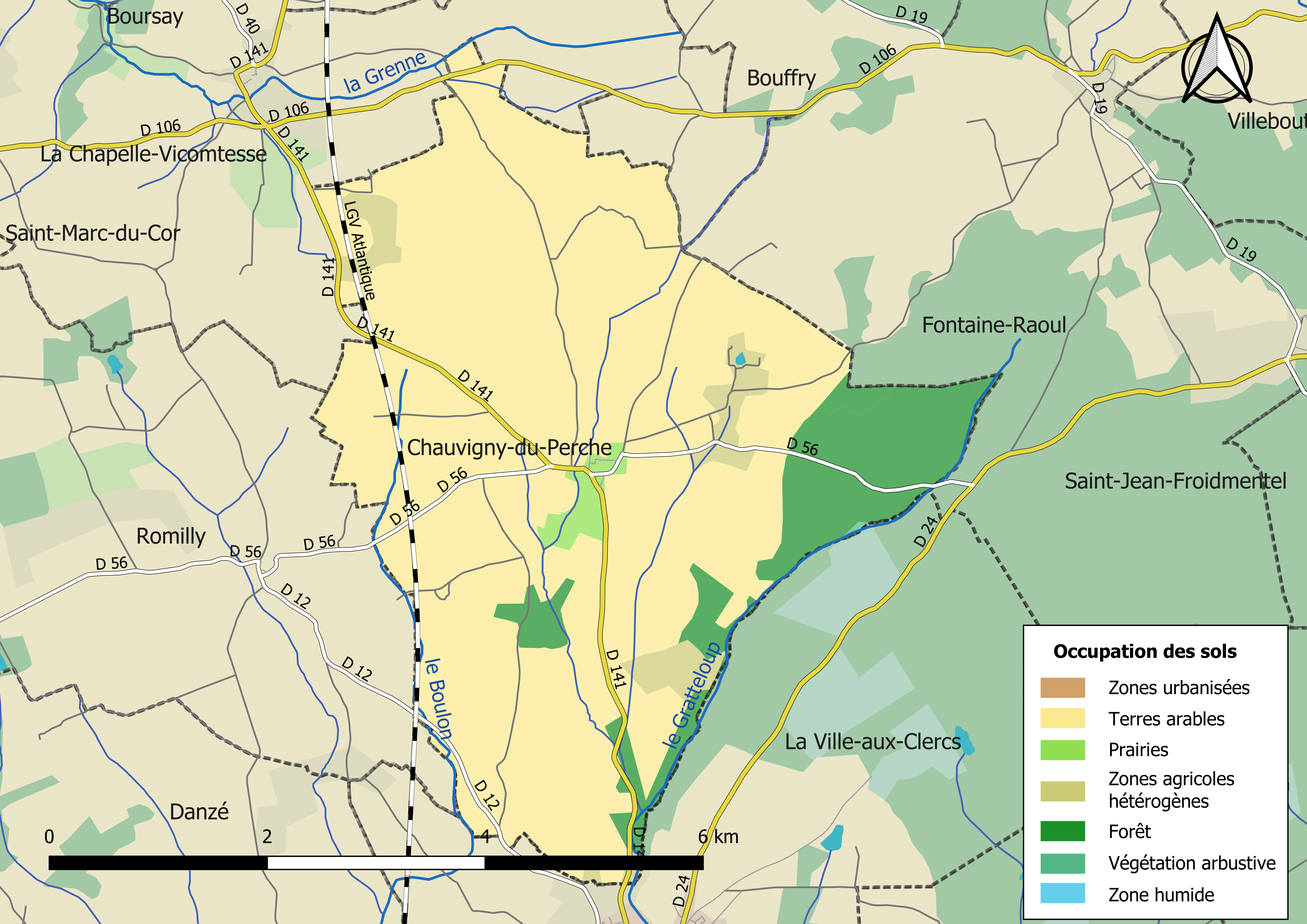 Carte des infrastructures et de l’occupation des sols en 2018 de la commune de Chauvigny-du-Perche (France).